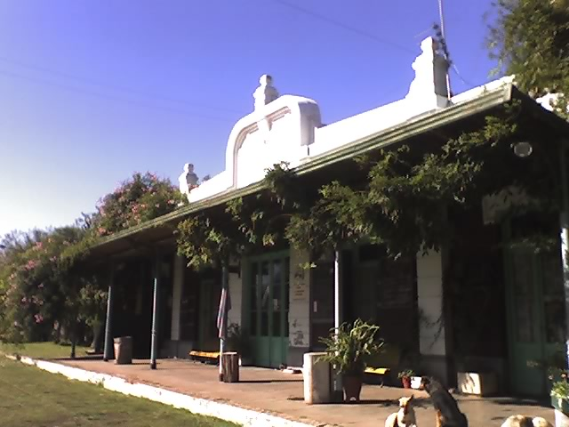 Veinte de Junio Railway Station, La Matanza Partido, Buenos Aires Province.